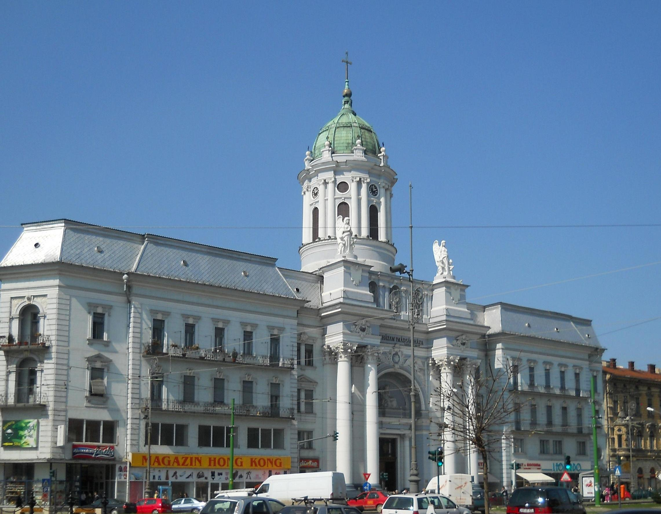 Vedere de ansamblu a catedralei